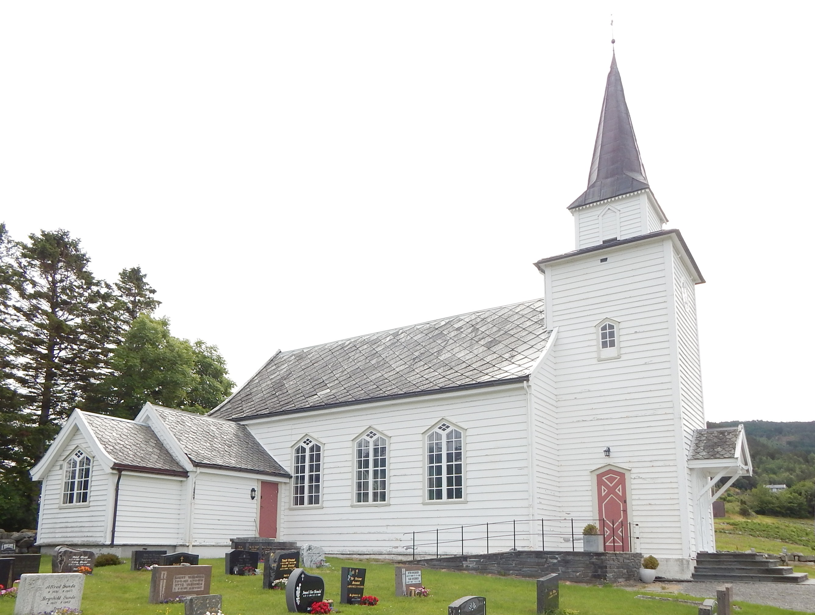 Vangsnes kirke